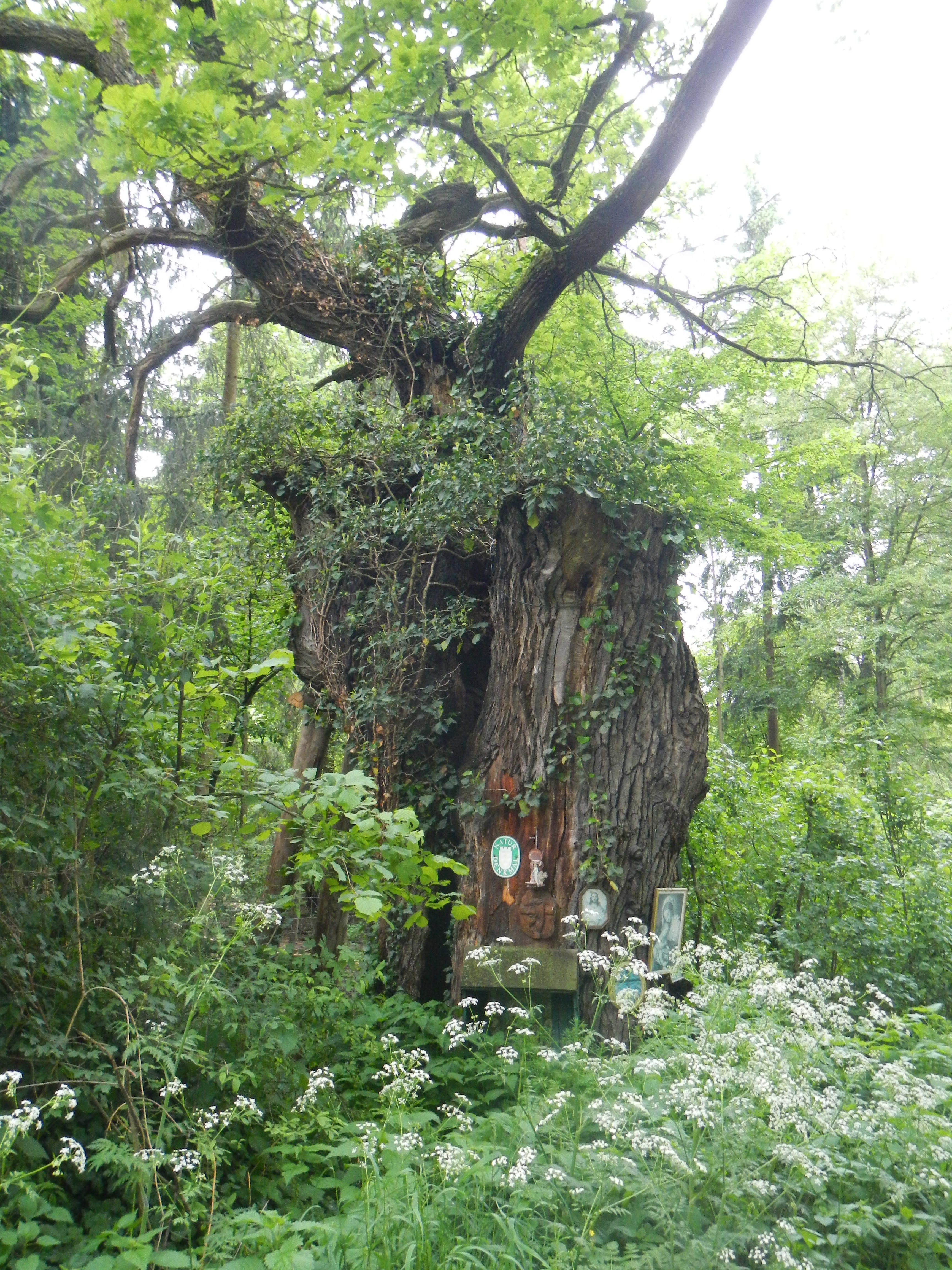 1 Eiche "Bildereiche" This media shows the natural monument in Lower Austria with the ID MI-013.